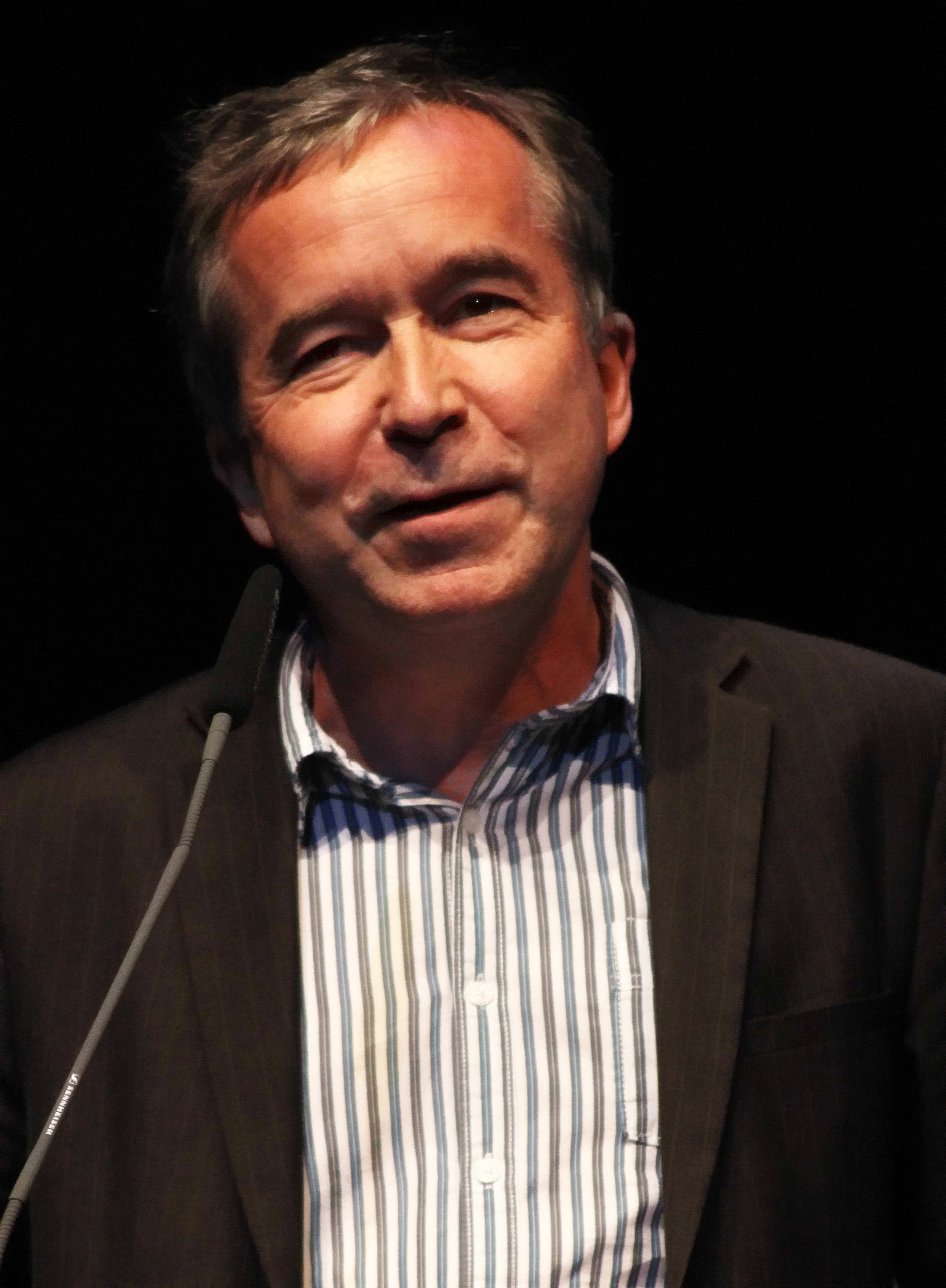 Bernd Burgemeister Fernsehpreis 2012 Jurymitglied Andreas Schreitmüller